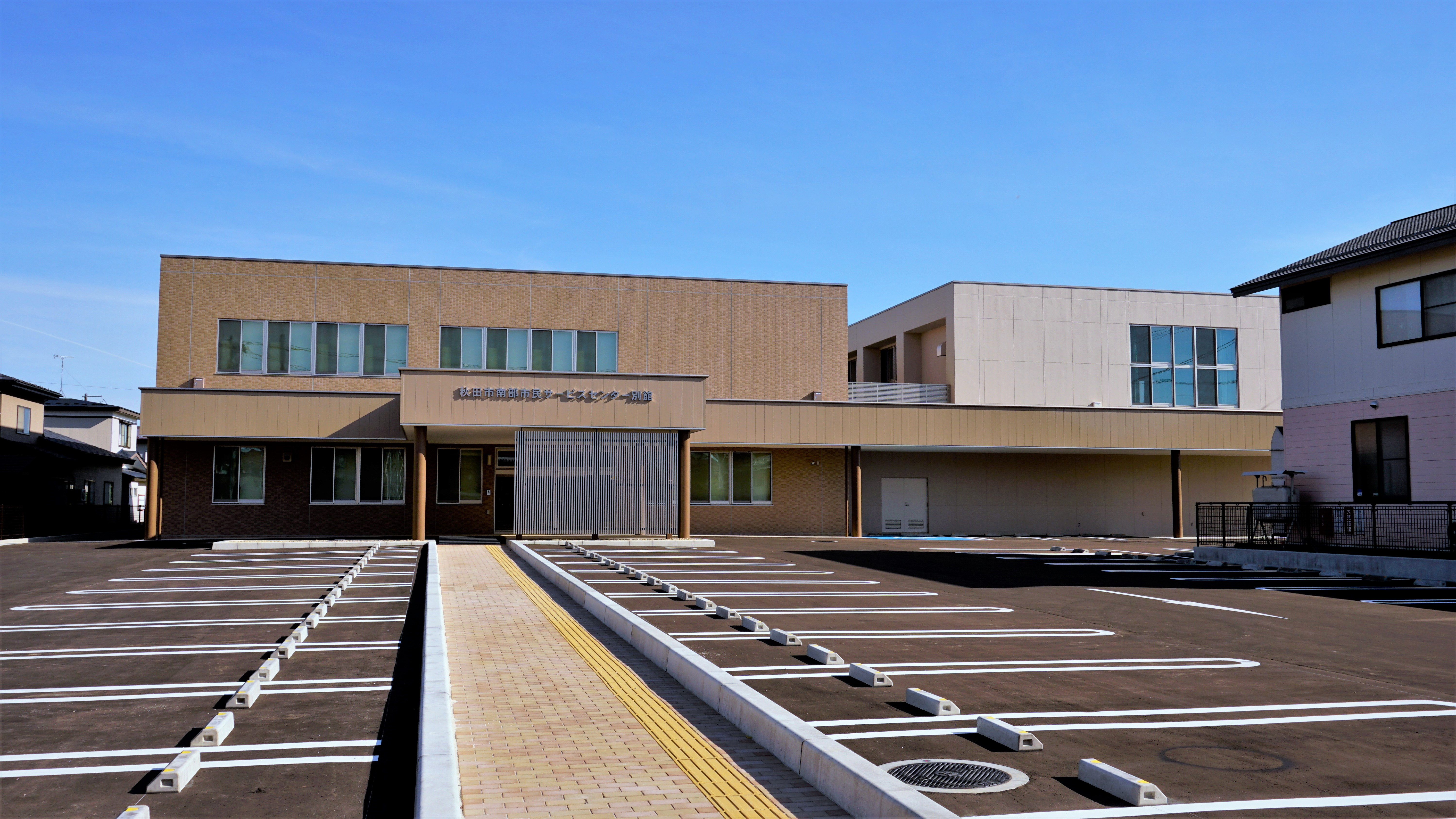 秋田市南部市民サービスセンター牛島別館。旧牛島公民館の跡地に建設された。